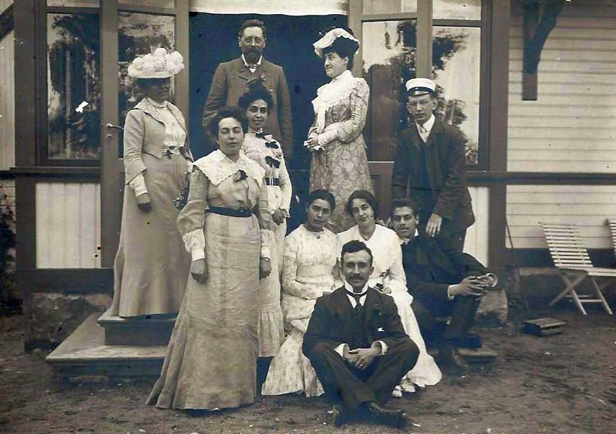 På Dalarö (troligen Djupvik) 1902 eller 1903 Bakre raden: Jenny Bonnier, Karl Otto Bonnier, Lisa Hirsch, Yngve Larsson Främre raden stående: Anna Thiel, Lisen Bonnier Sittande: Elin Bonnier (Larsson), Signe Thiel Henschen, Tor Bonnier Framför: En spanjor? (enligt Yngve Larsson den yngre)